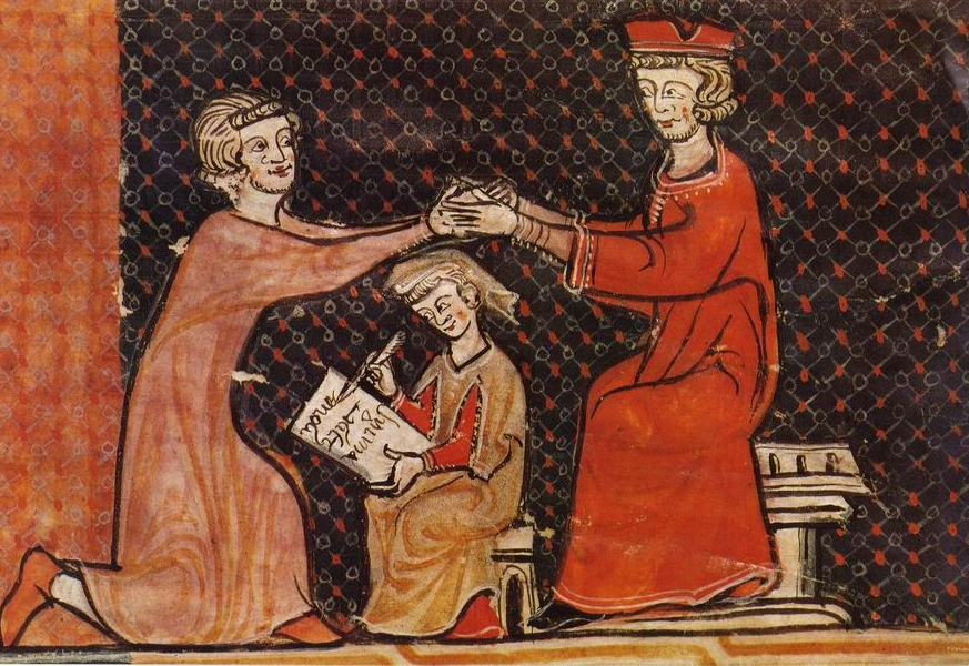 miniature des Archives Départementales de Pyrénées-Orientales 1B31, Capbreu du roi Jacques II de Majorque pour le terroir de Tauteval, 1293, représentant un tenancier mettant ses mains dans celles du procureur du roi